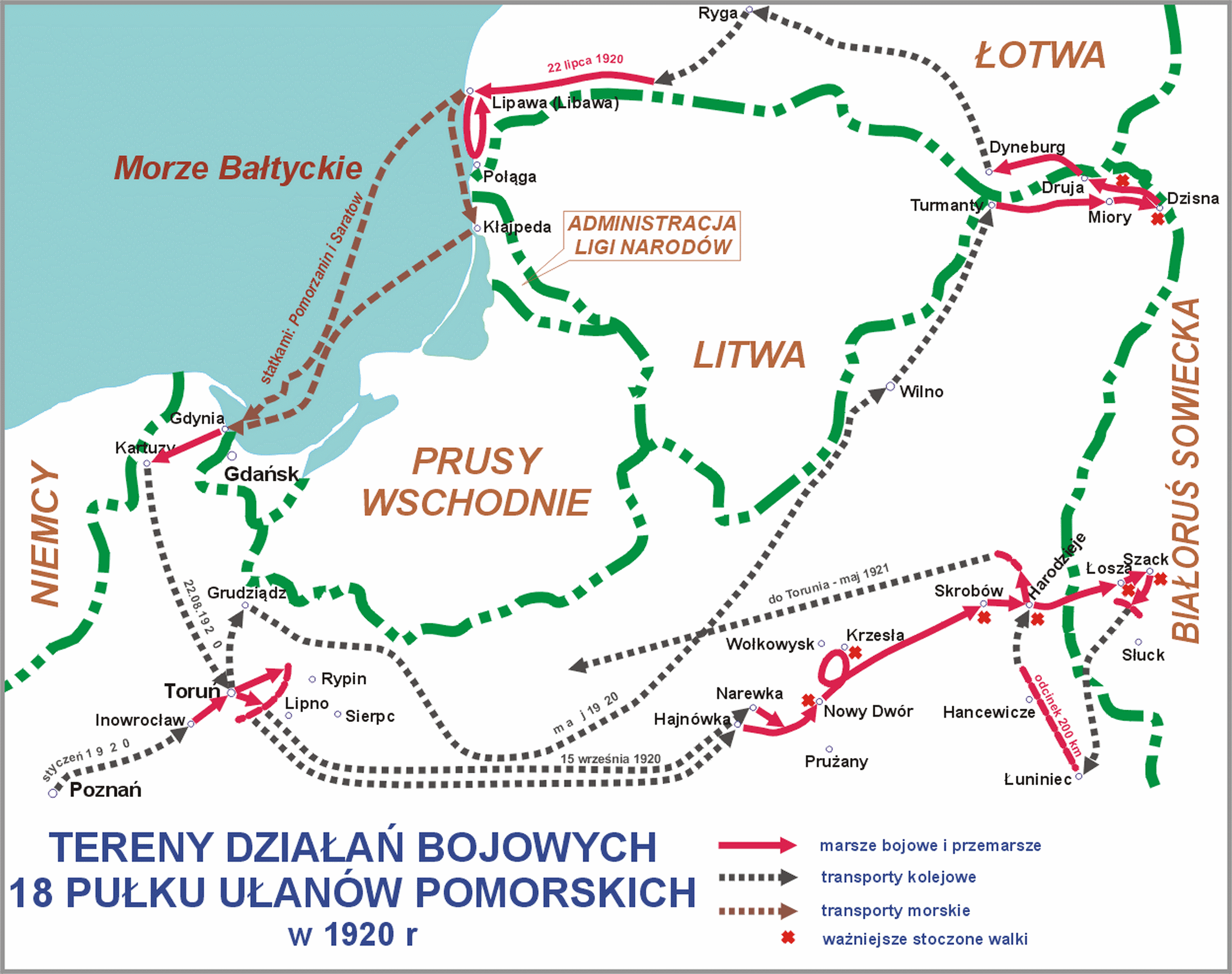 Tereny działań bojowych 18 Pułku Ułanów Pomorskich w 1920 r